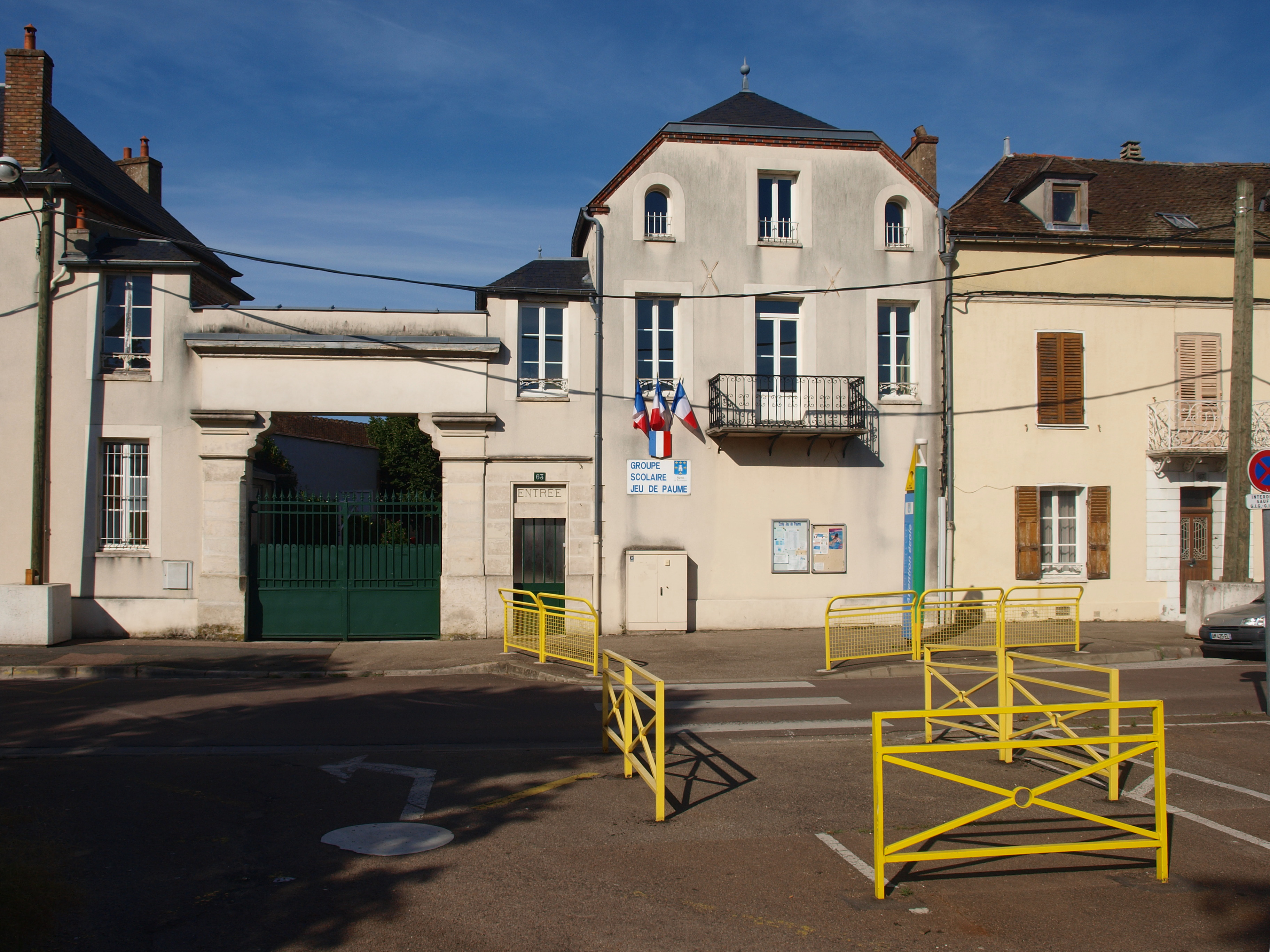 Sens (Yonne, France) ; groupe scolaire du Jeu de Paume